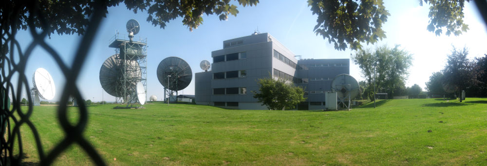 BND-Liegenschaft in Schöningen, aufgenommen im Rahmen eines Protest-Spaziergangs im Sommer 2014